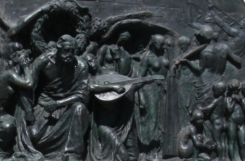 Détail du monument consacré à Verdi à Parme